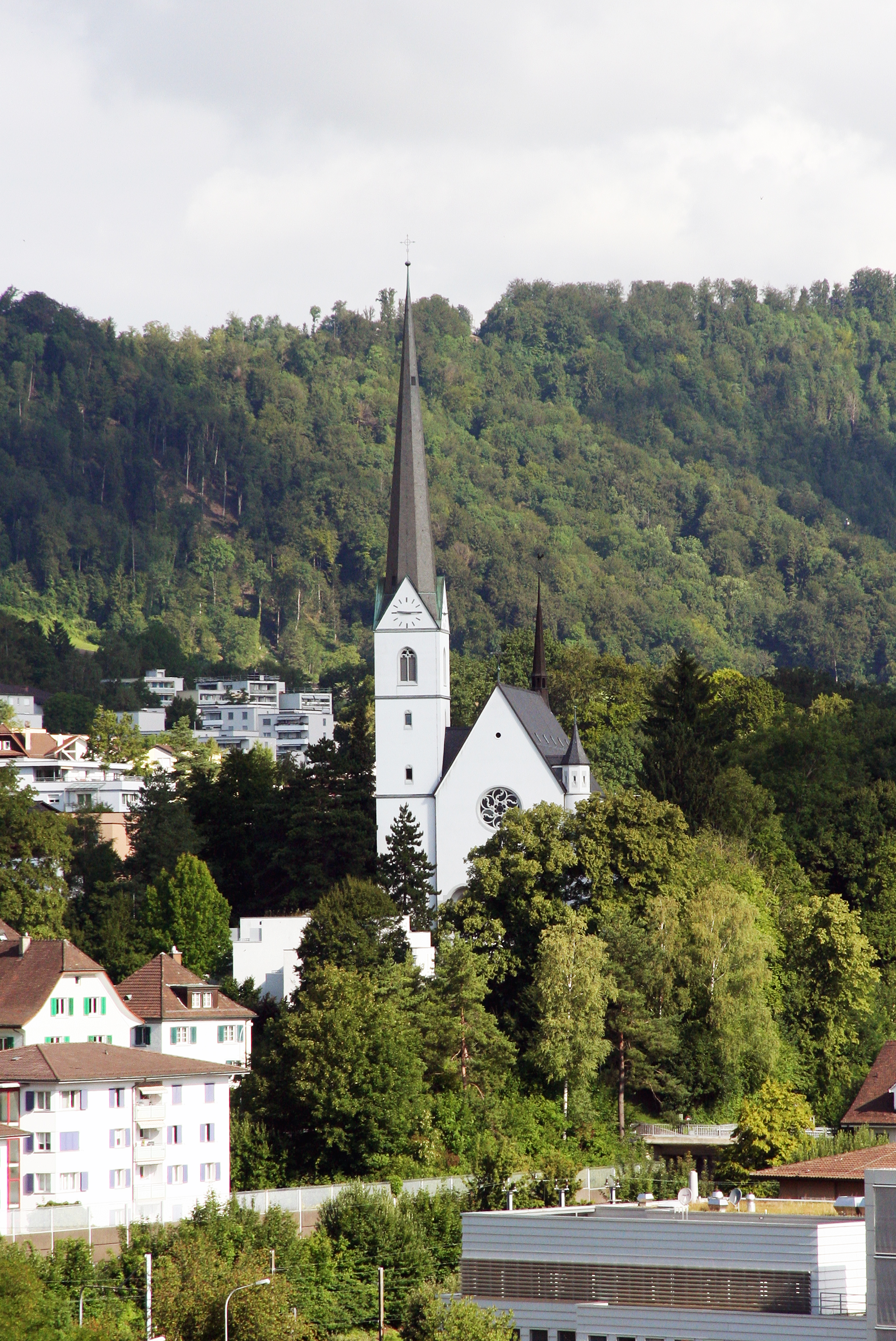 Römisch-katholische Pfarrkirche Hl. Dreifaltigkeit Adliswil, Ansicht von Südosten